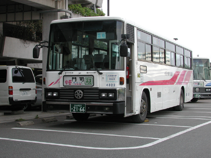 福岡ドームにて、2001-5-24撮影